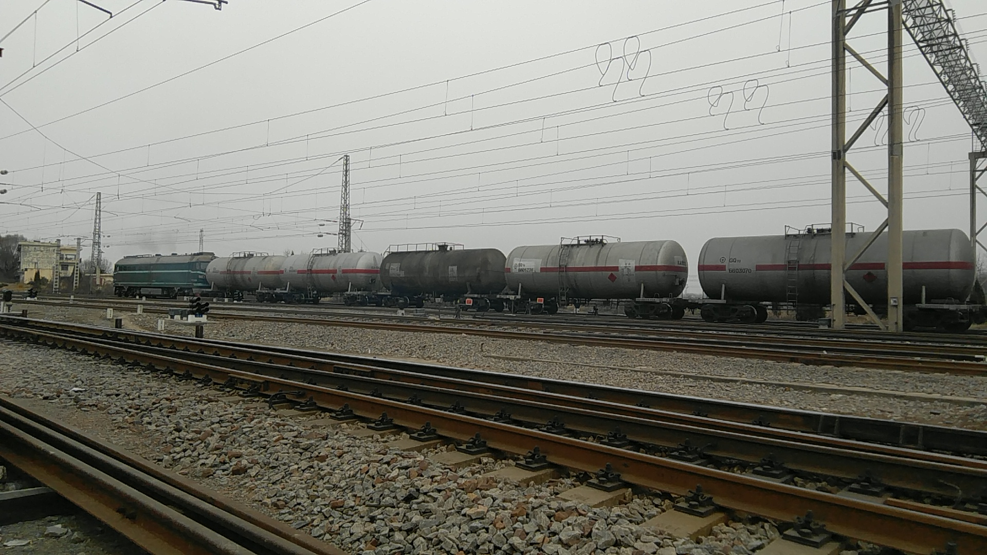 商丘北站，编组站